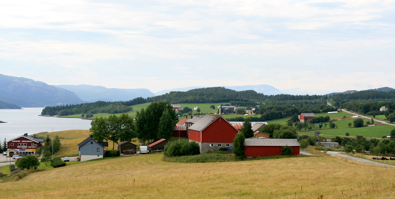 Seierstad, Jøa, Fosnes, Nord-Trøndelag, Norway.